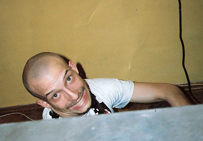 DJ Tomcraft beim Plattenpoolen in einem Münchner Club 1994